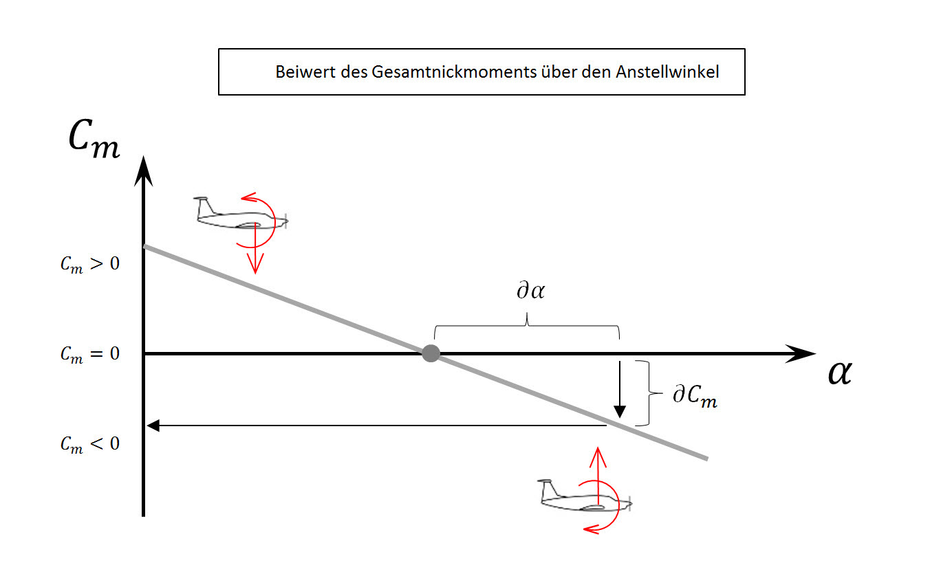 Die Abbildung zeigt den qualitativen Verlauf des resultierenden Nickmomentbeiwert über den Anstellwinkel, bei einem statisch längsstabilen Flugzeug.